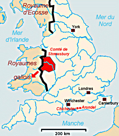 Carte de l'Angleterre vers 1087 avec le comté de Shrewsbury